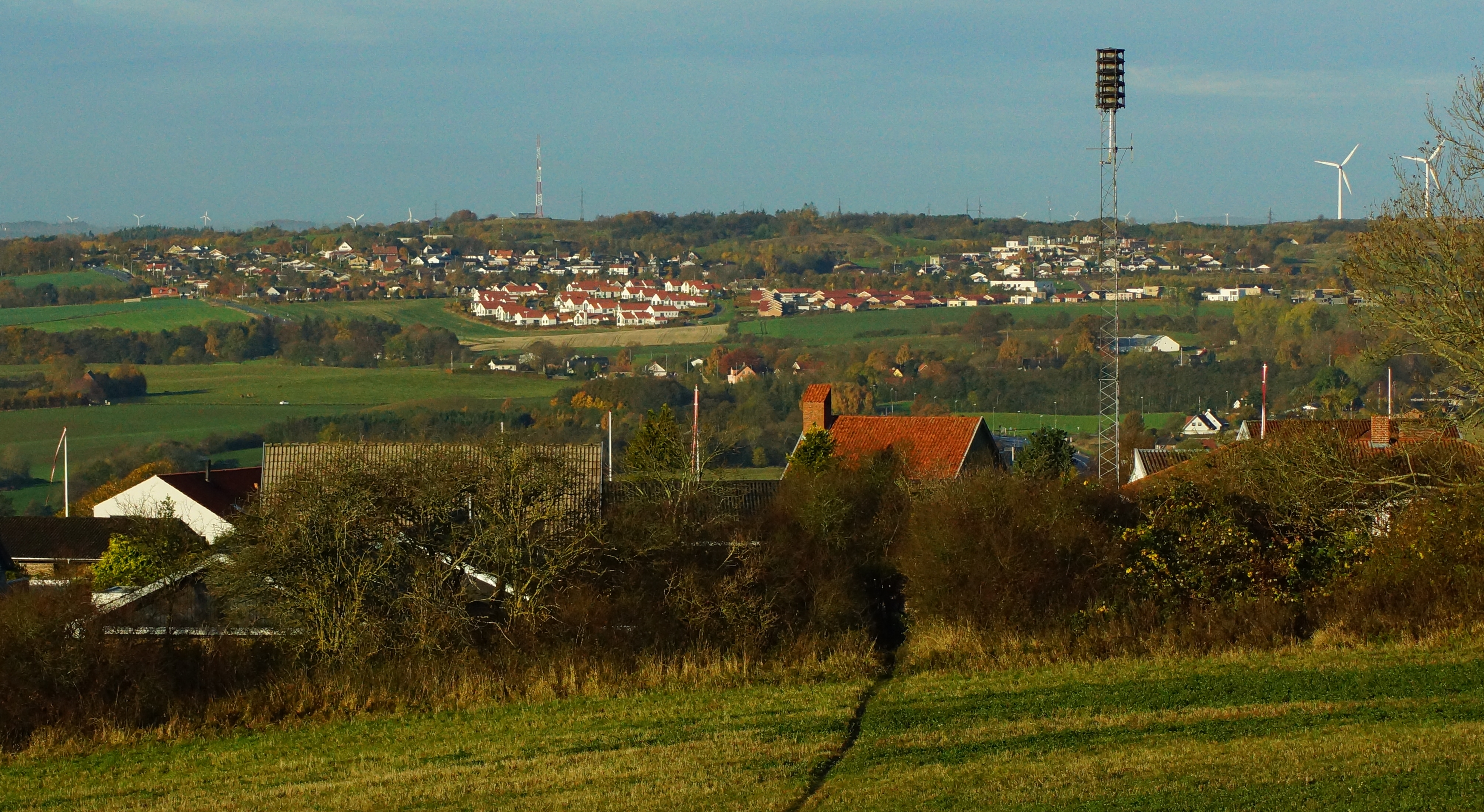 Følle set fra toppen af Rønde